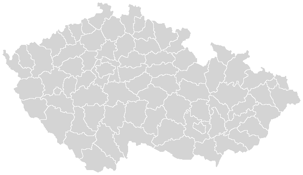 Mapka českých okresů v letech 2005-2006